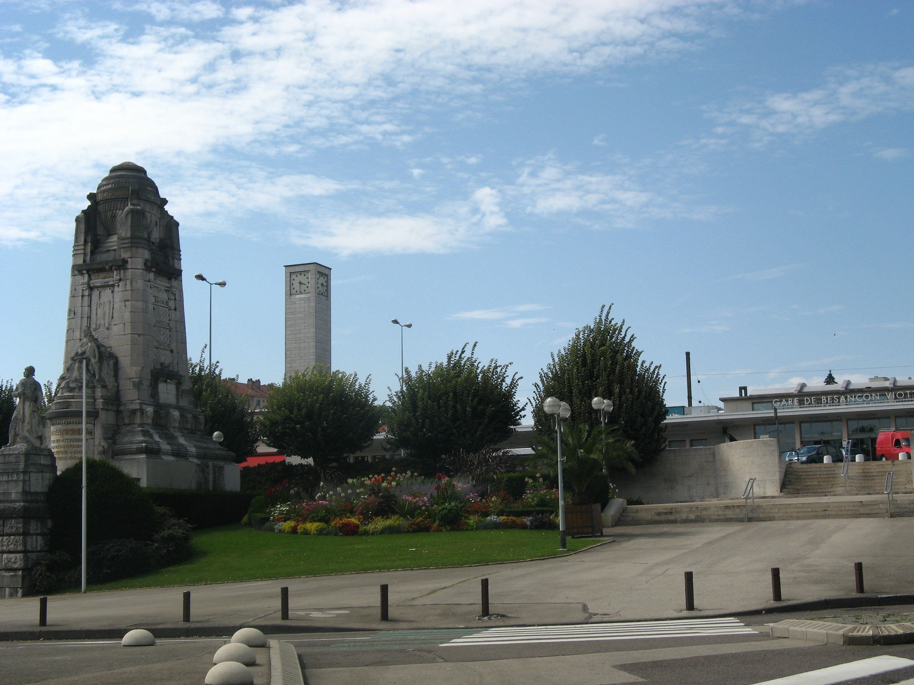 gare viotte besancon